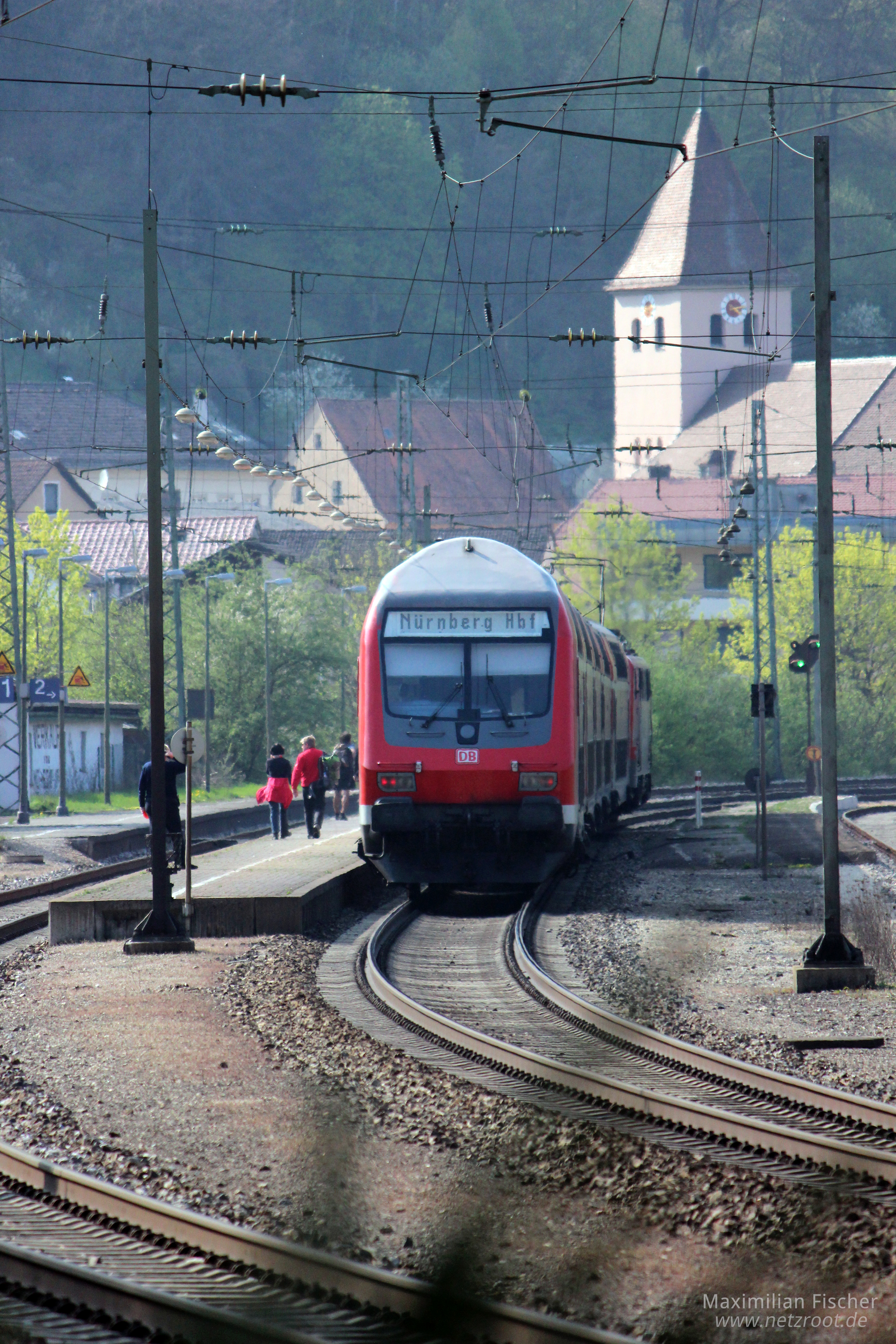 Der Dosto-Steuerwagen, gezogen von der ADAC-BR 111 024-6 ( am Bahnhof Solnhofen in Richtung Nürnberg HBF. I Hintergrund die örtliche Kirche. Aufgenommen am 13. April 2014.